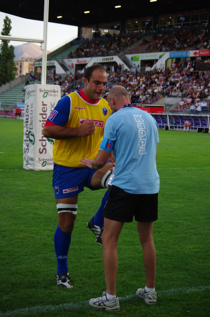 Olivier Chaplain, 3e ligne du FC Grenoble rugby